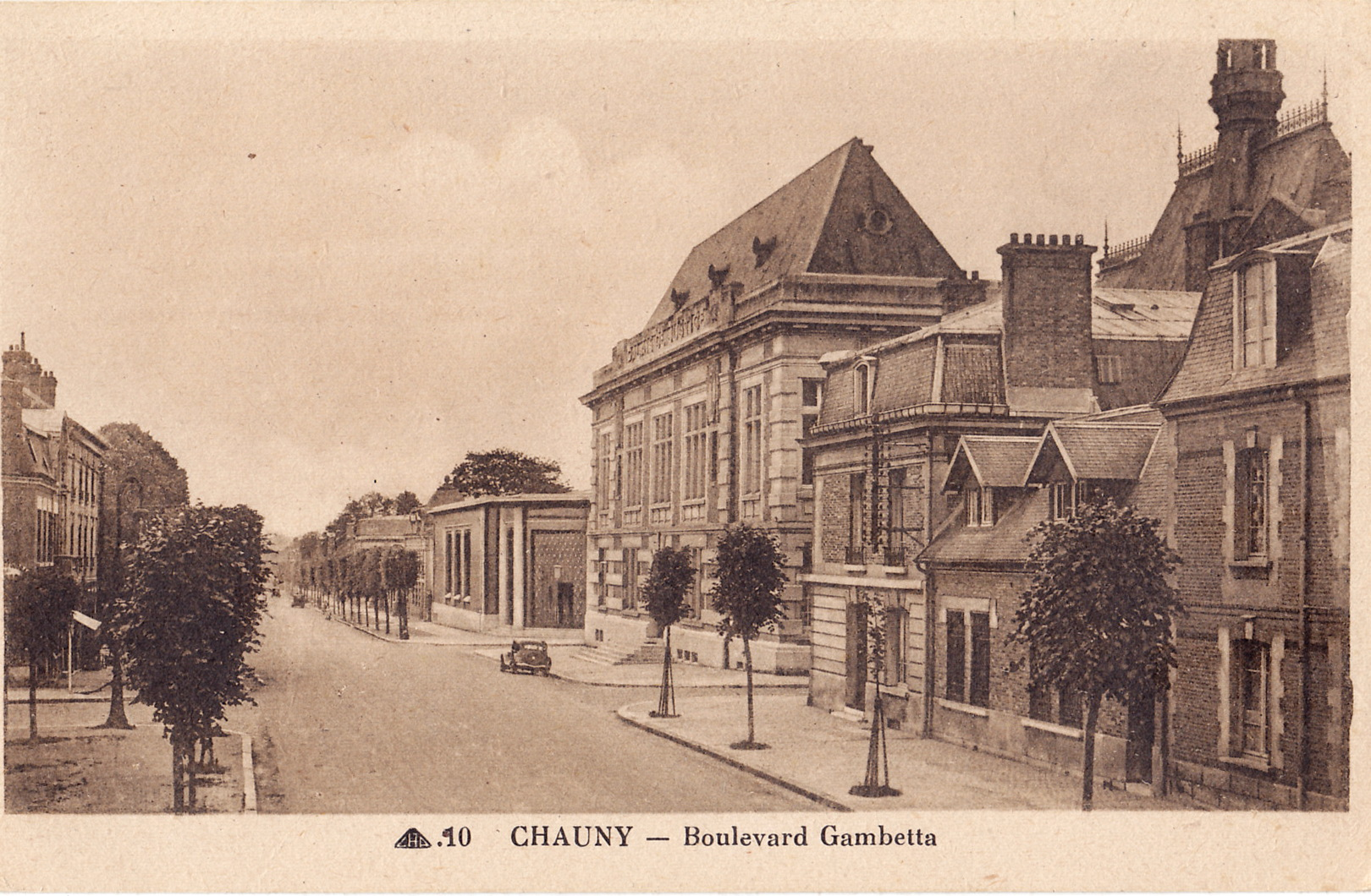 Carte postale ancienne éditée par CAP pour Lacour, Tabac à Chauny :CHAUNY - Boulevard Gambetta